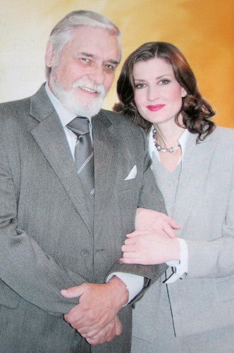 Оксана Лесная и Ростислав Янковский в спектакле «Перед заходом солнца», 2007 год